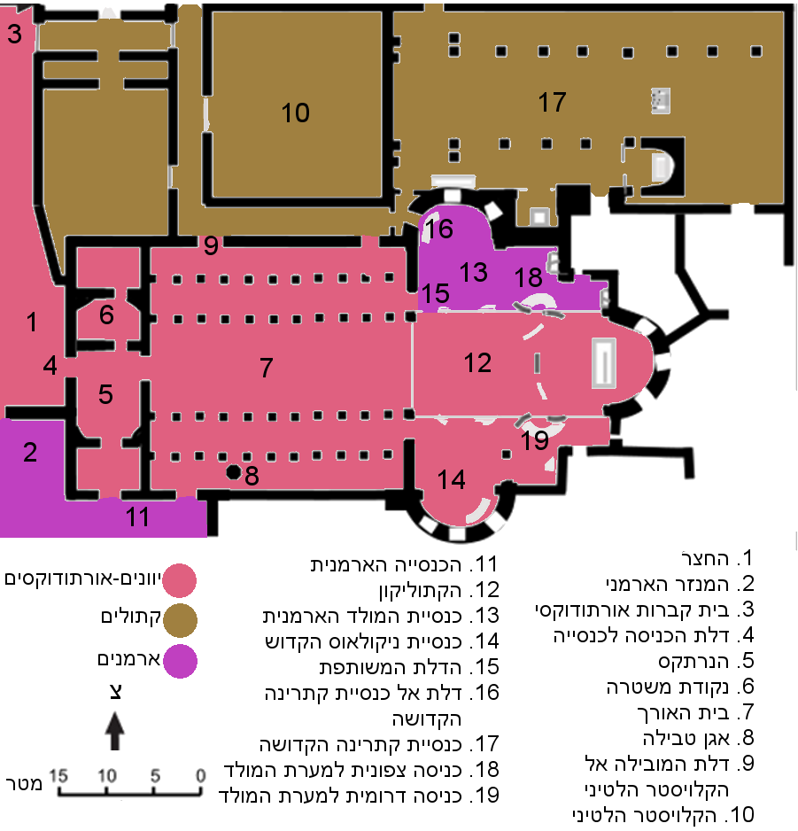 כנסיית המולד